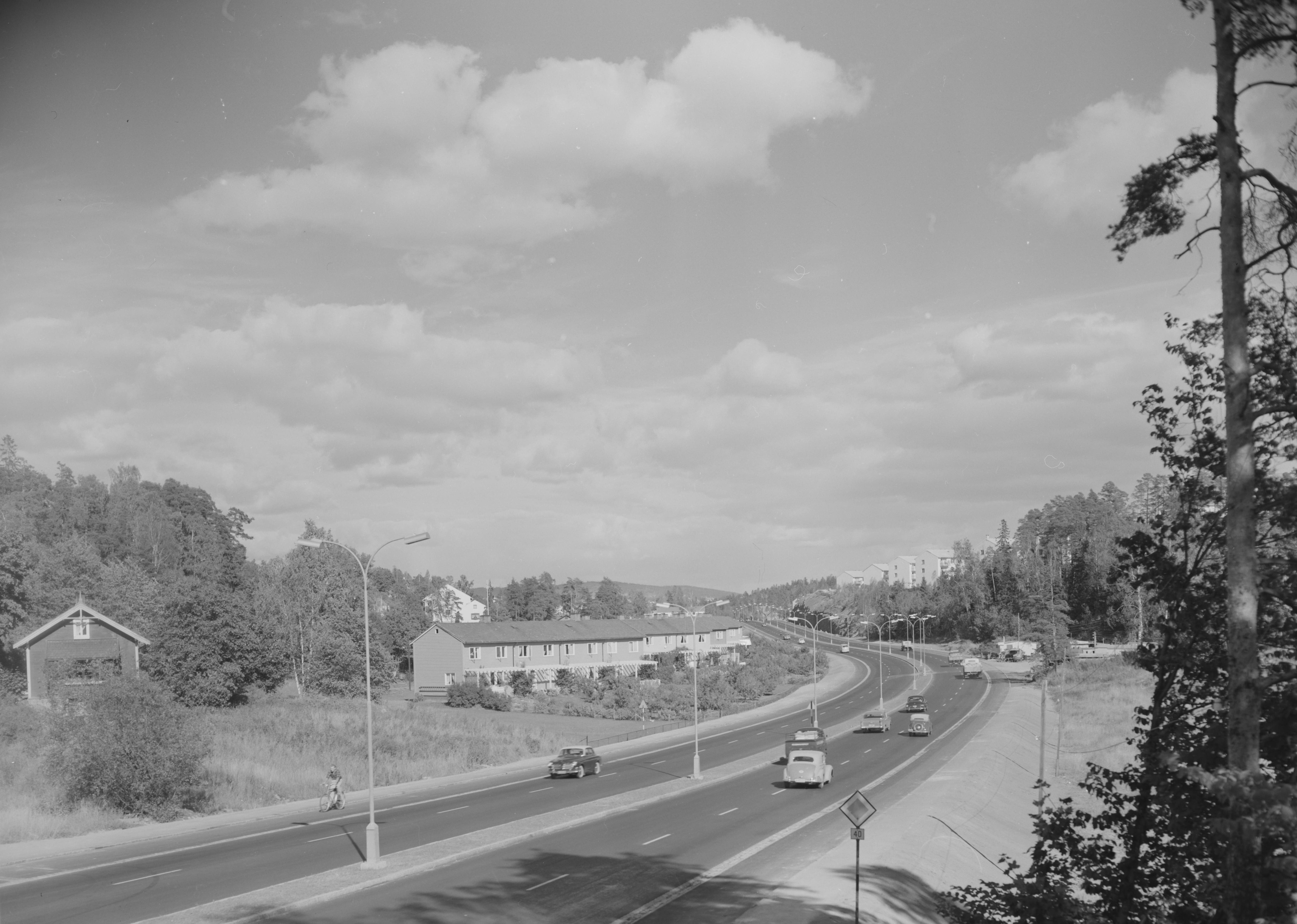 Bildet er hentet fra Nasjonalbibliotekets bildesamling Fornebu, Bærum, Akershus Depicted person: Brun, Jac